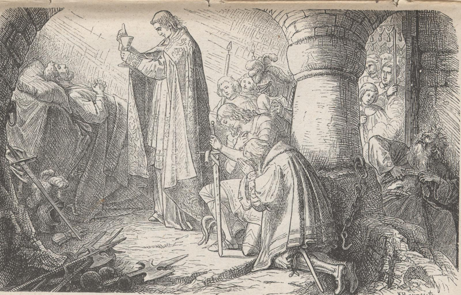 Philipp von Flersheim, Bischof von Speyer am Sterbebett Franz von Sickingen